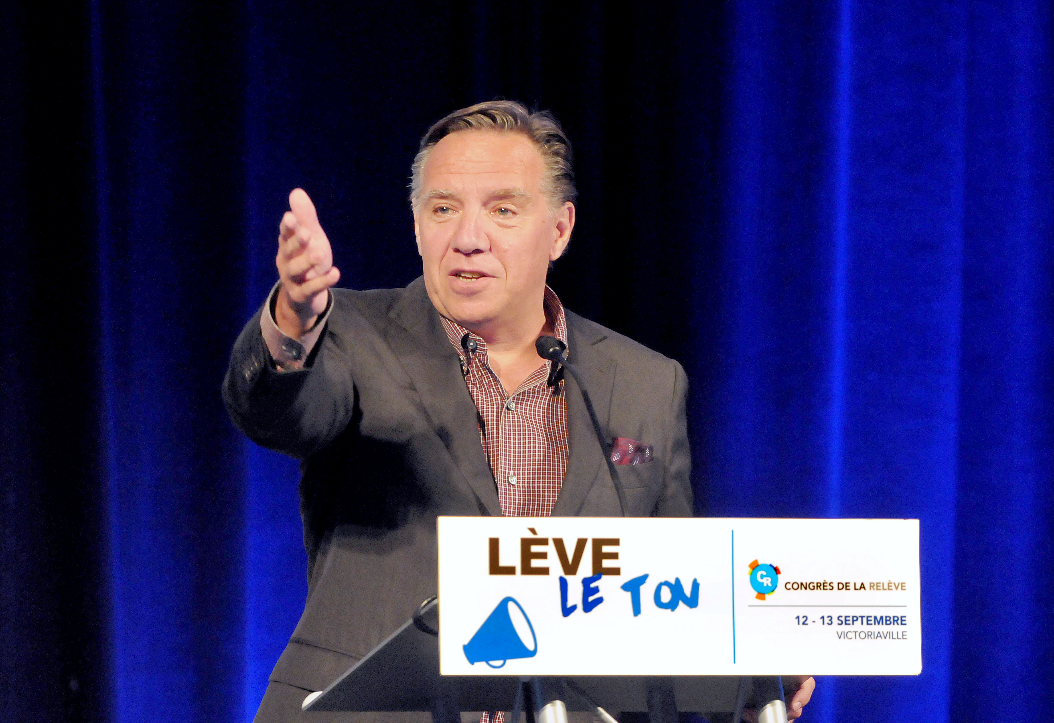 François Legault au Congrès de la Relève le 13 Septembre 2015